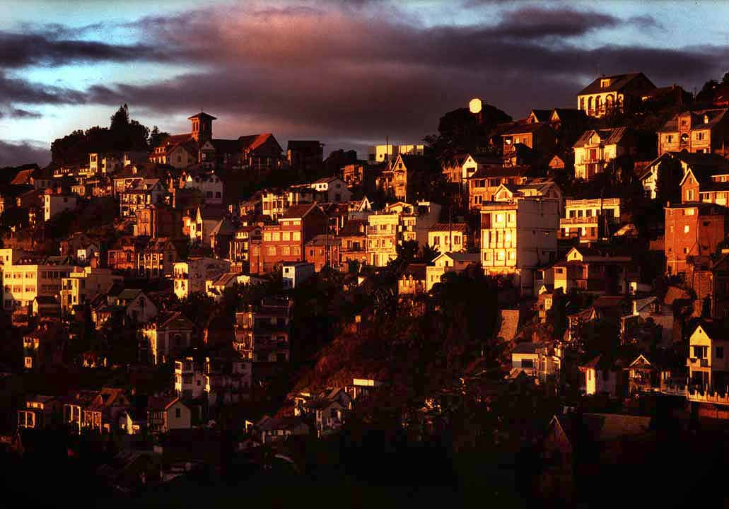 Antananarivo (Madagascar) at sunset